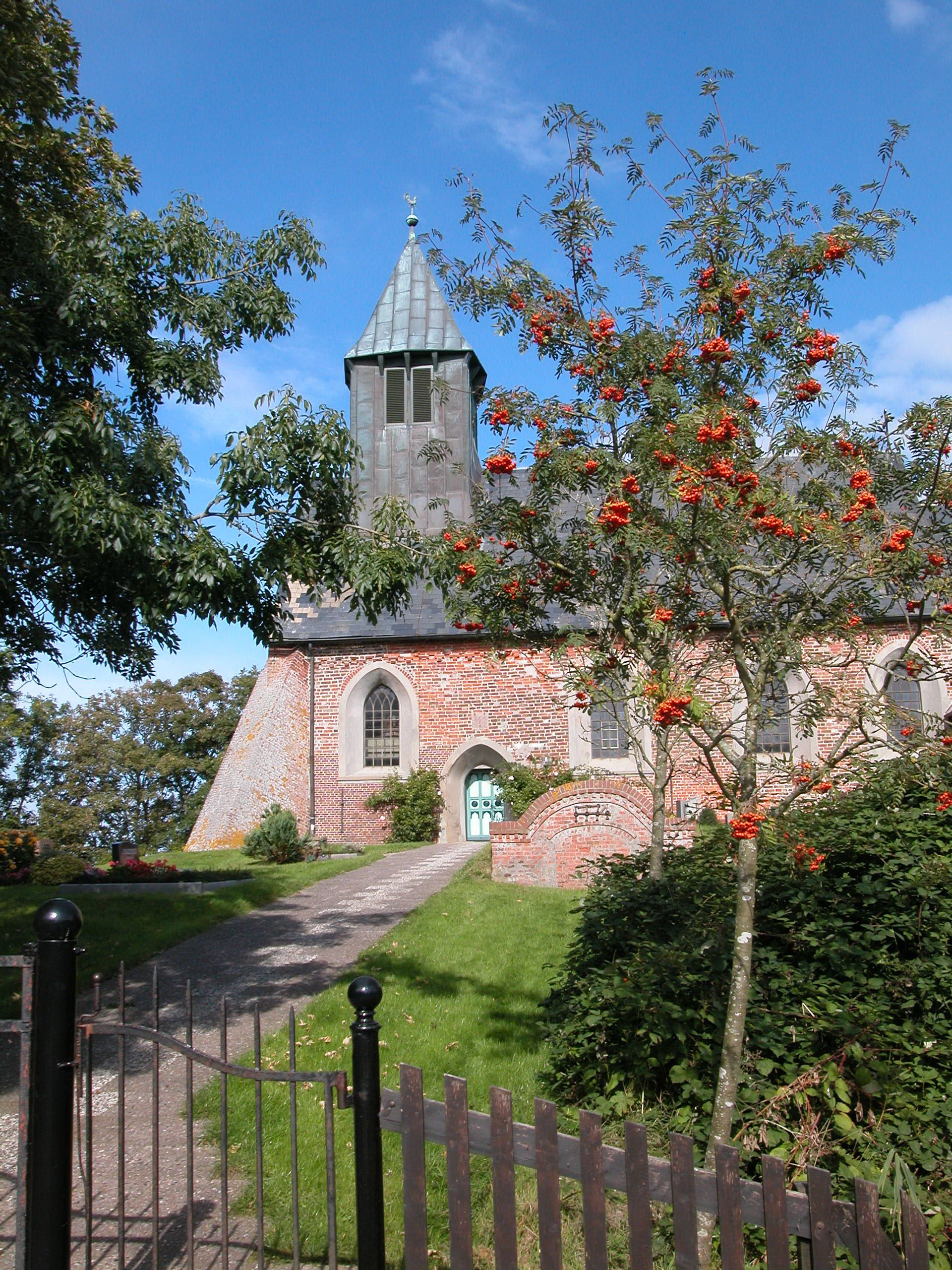 Osterhever,_St. Martin Standort:54°23′6.38″N 8°45′52.43″E / 54.3851056°N 8.7645639°E